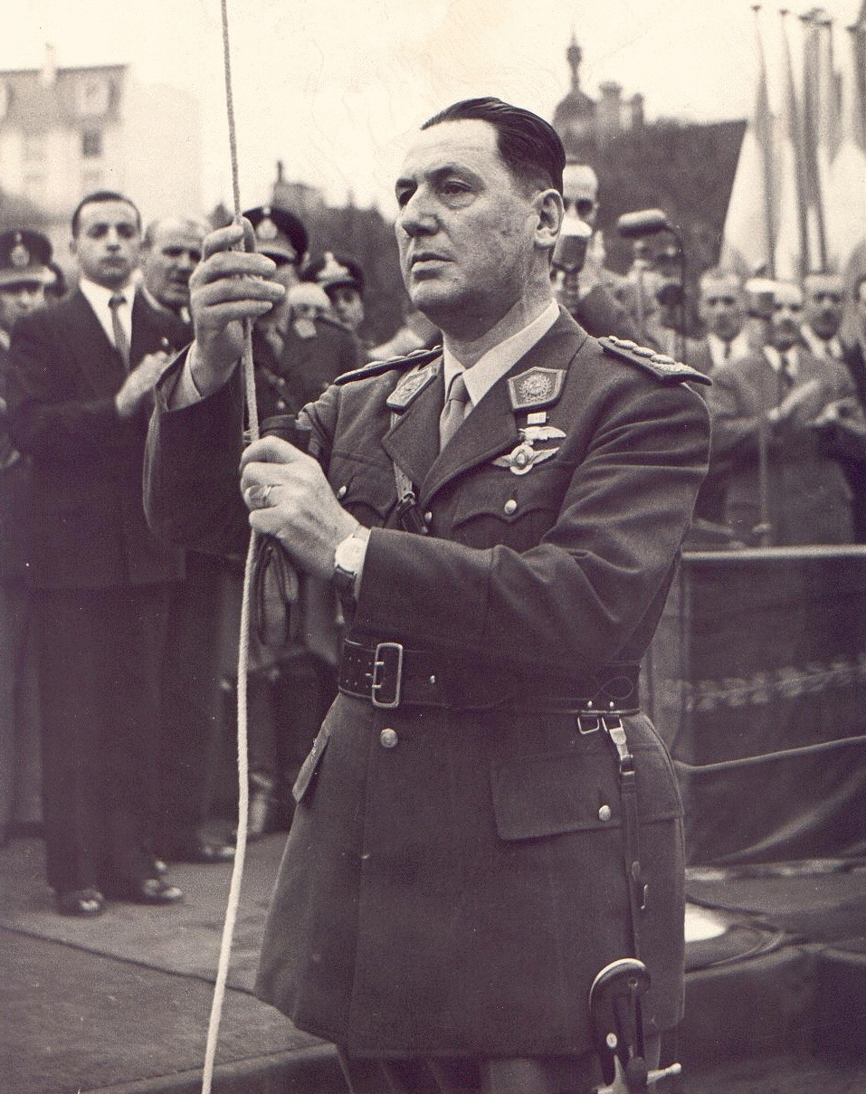 Juan Domingo Perón con uniforme.